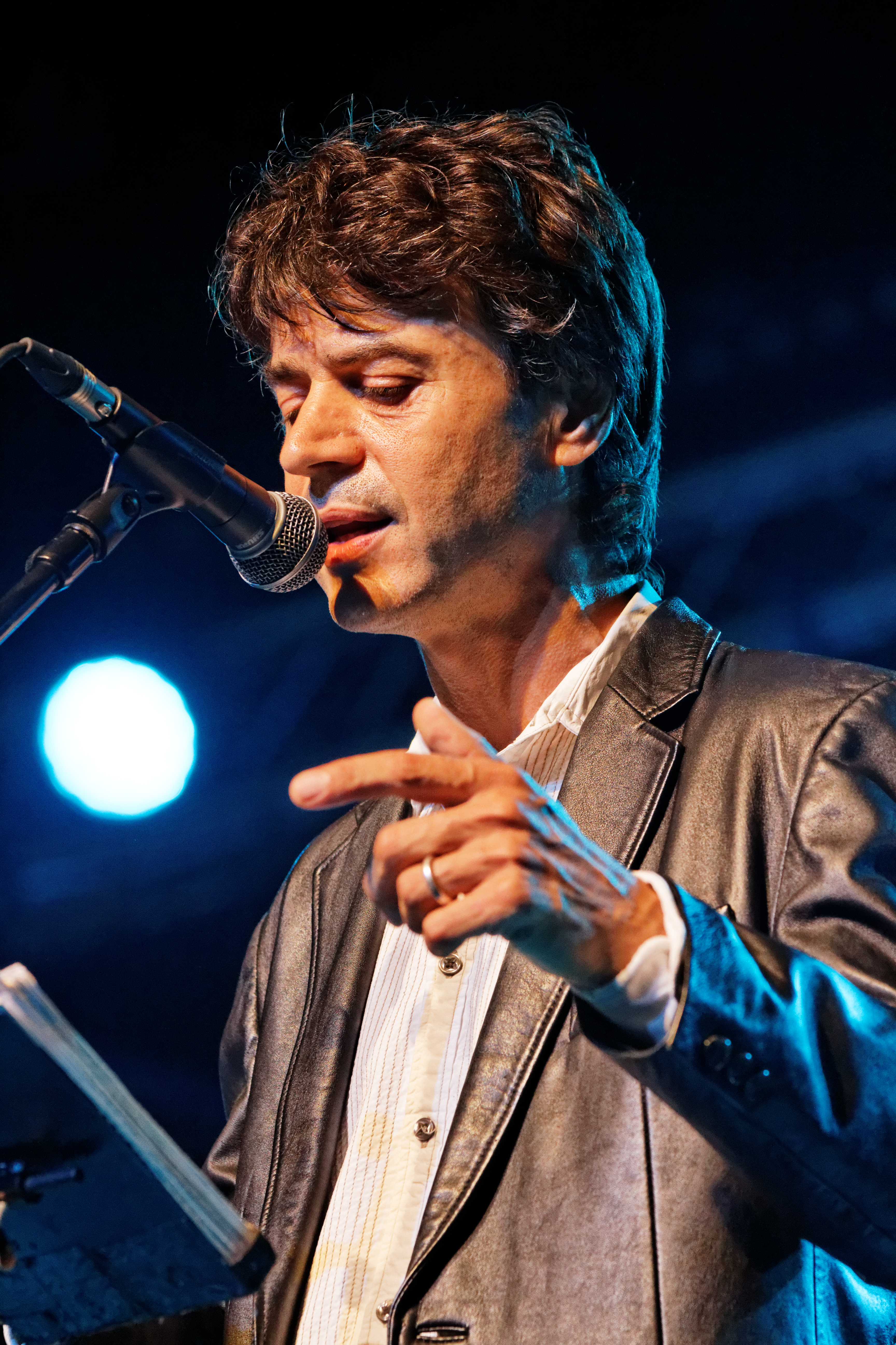 Denez Prigent en concert sur la scène Gradlon lors du festival de Cornouaille 2014.